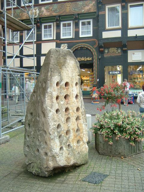 Stein des Anstoßes, eine Skulptur in Einbeck hinter der Kirche in der Altstadt. Im Sept. 1998 von Bürgern der Stadt Einbeck gestiftet, er bleibt bis zur Halbierung der Arbeitslosigkeit in Einbeck, die zur zeit der Errichtung 2341 betrug.